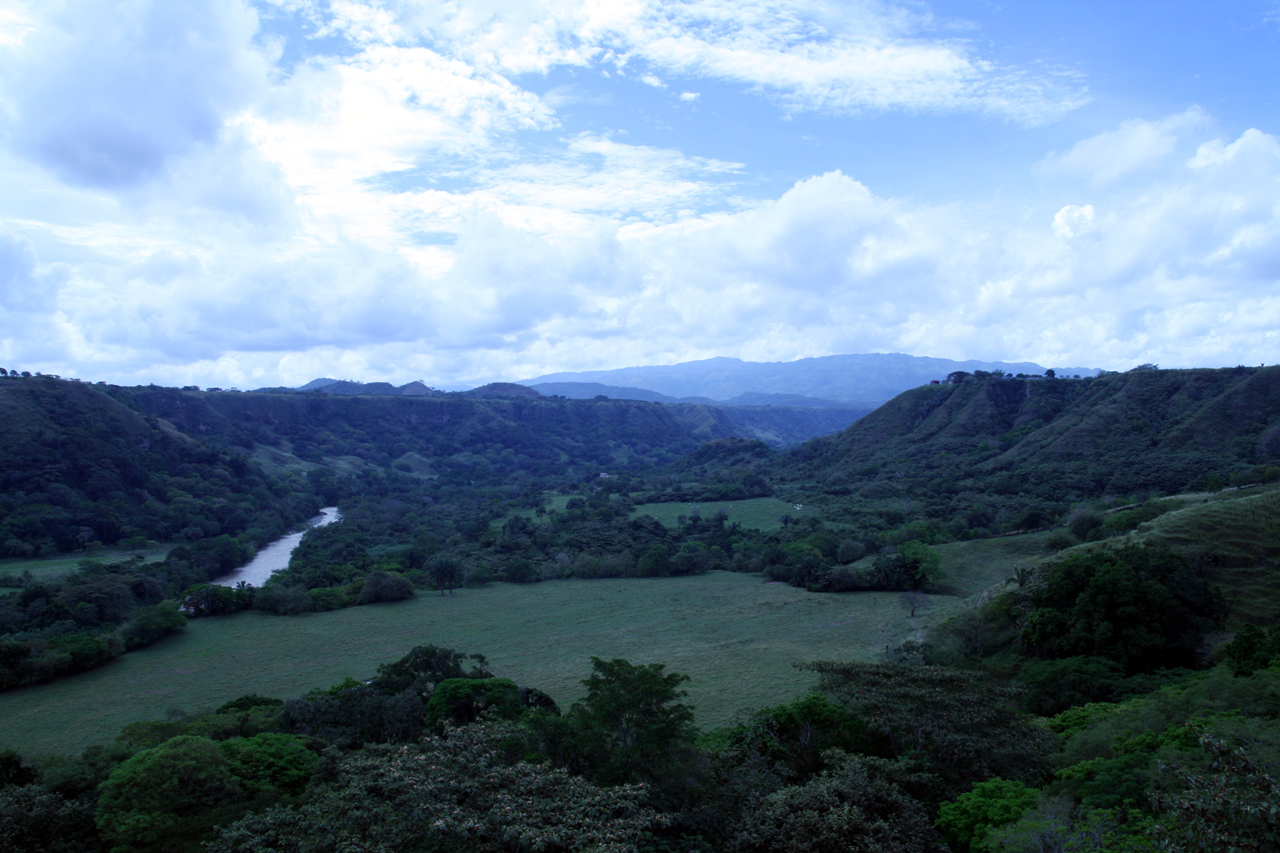 Rio Coello à Ibagué (Colombie)